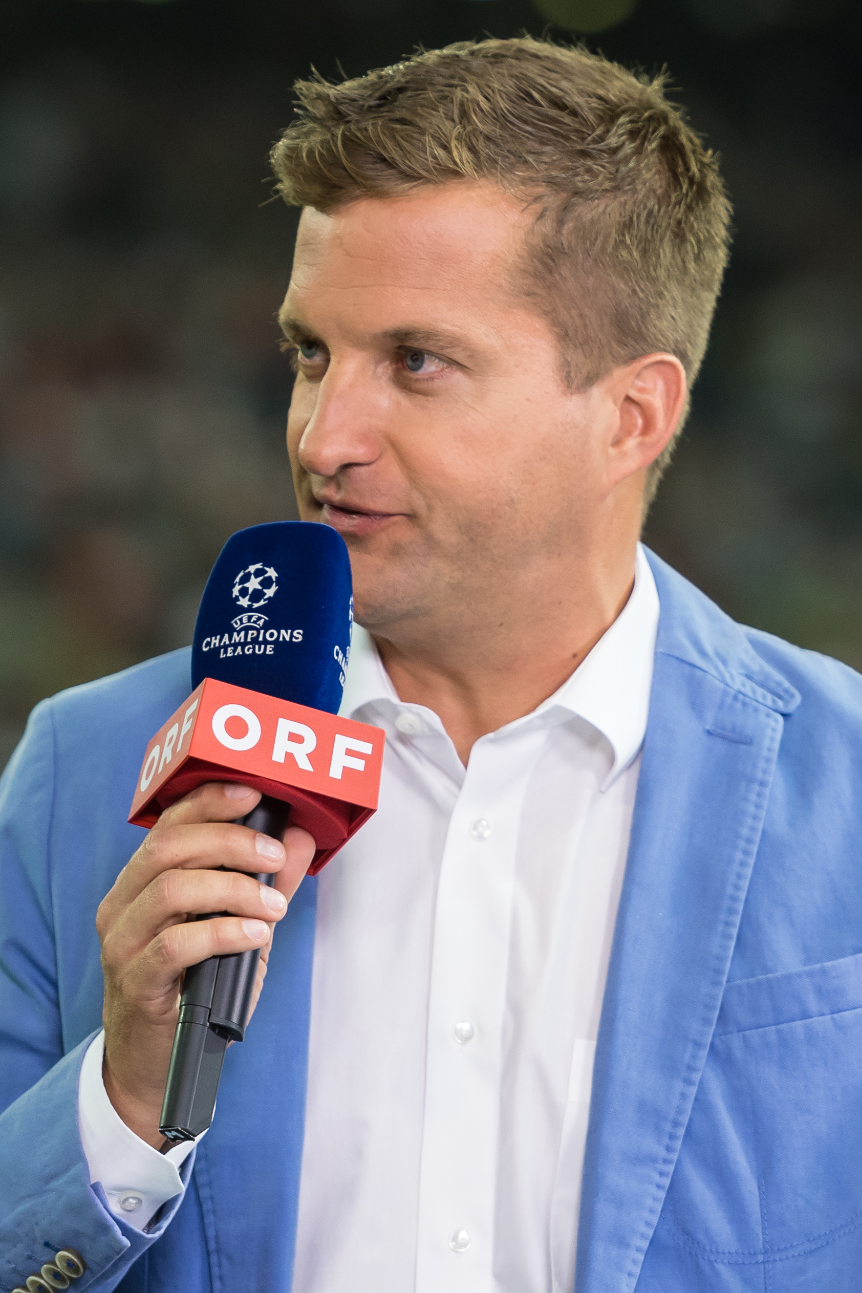 UEFA Champions League - Play-Offs - FC Salzburg vs Dinamo Zagreb. Bild zeigt Oliver Polzer.